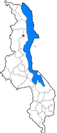 Mzuzu, Malawi Location Map